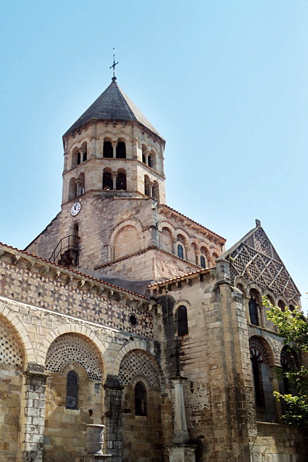 France - Auvergne - Église Saint-Julien de Chauriat